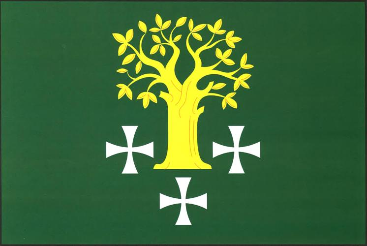 Bukovník vlajka